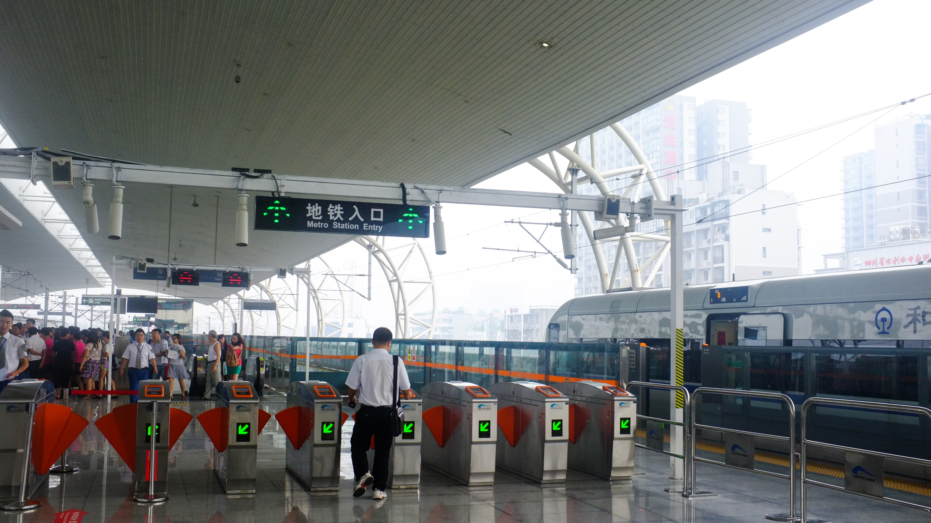 成灌铁路犀浦站